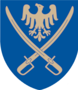 logo